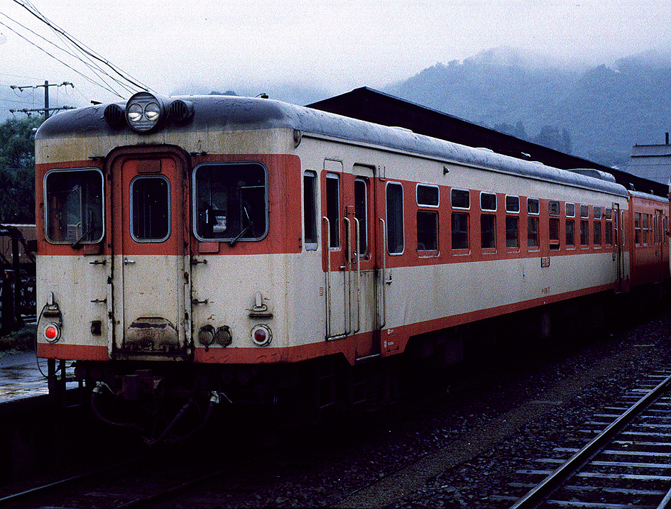 国鉄キハ26 17